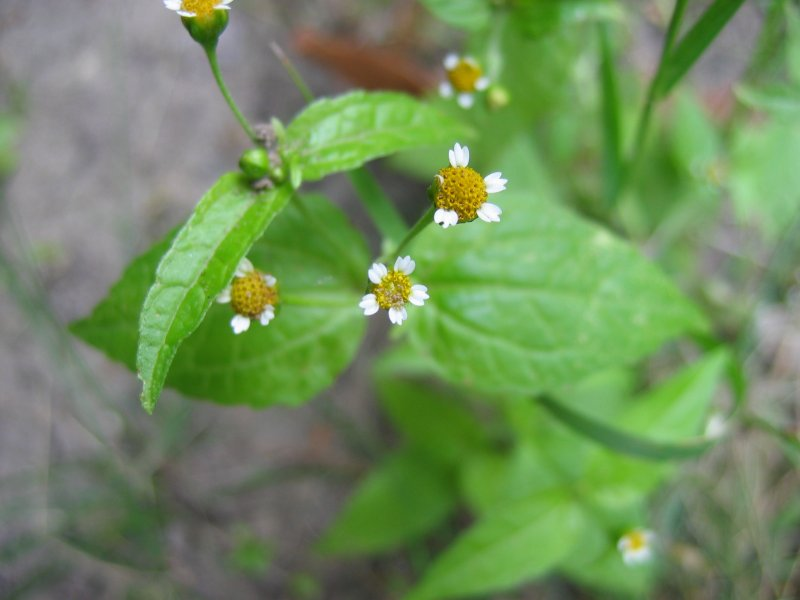 Kleinblütiges Franzosenkraut Galinsoga parviflora